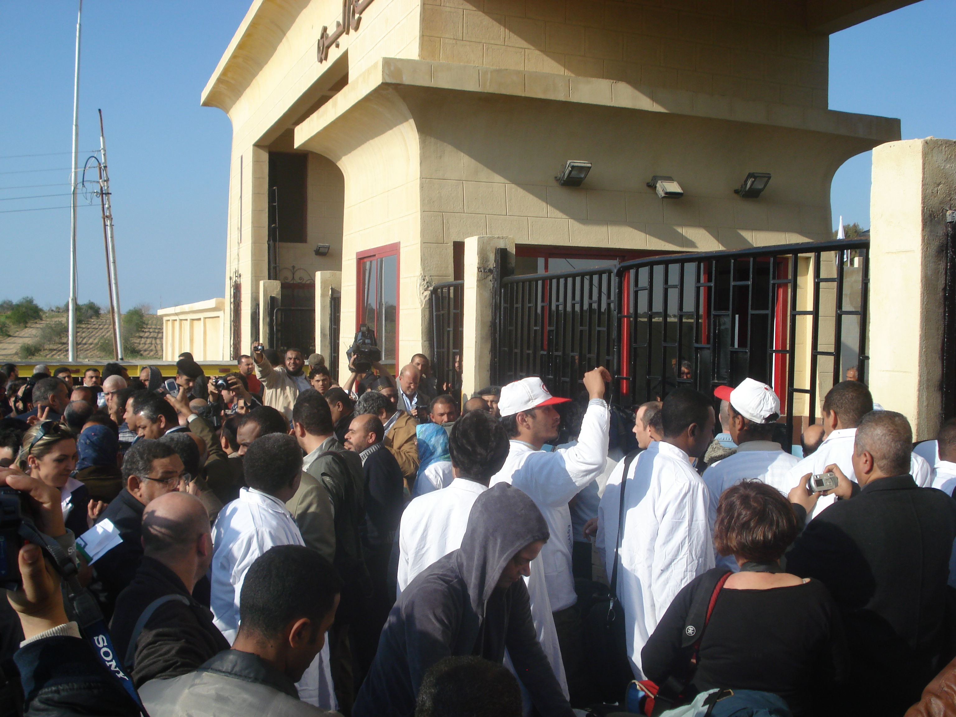 Road to Gaza 056